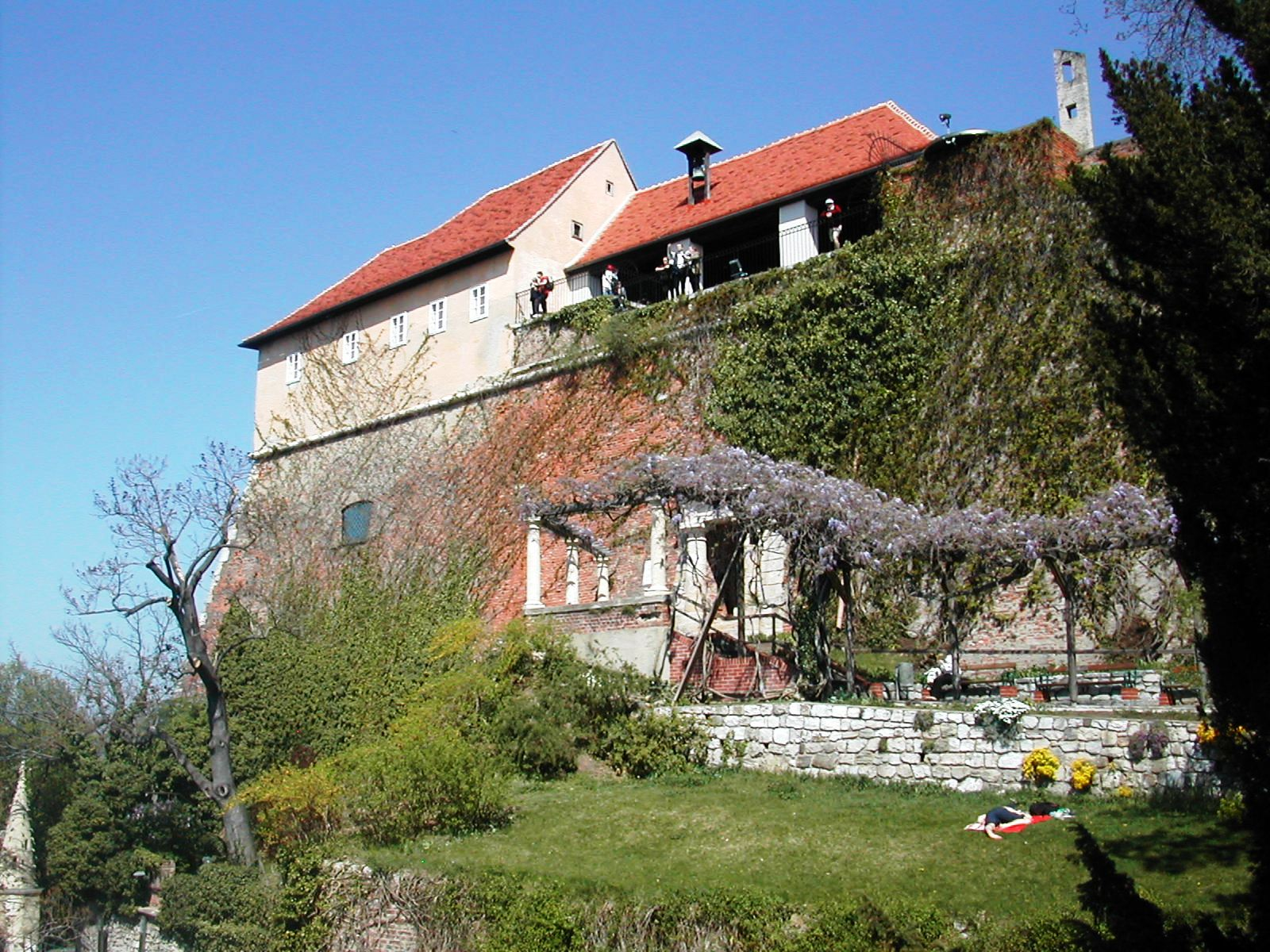 Stall- oder Kanonenbastei auf dem Grazer Schlossberg